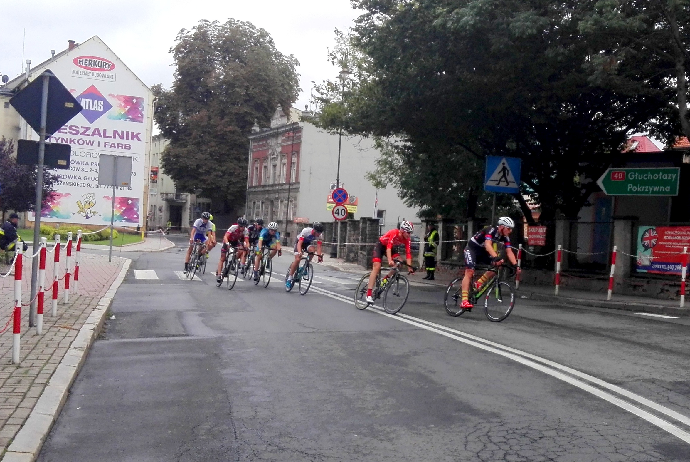 Prudnik, VI Memoriał im. Stanisława Szozdy